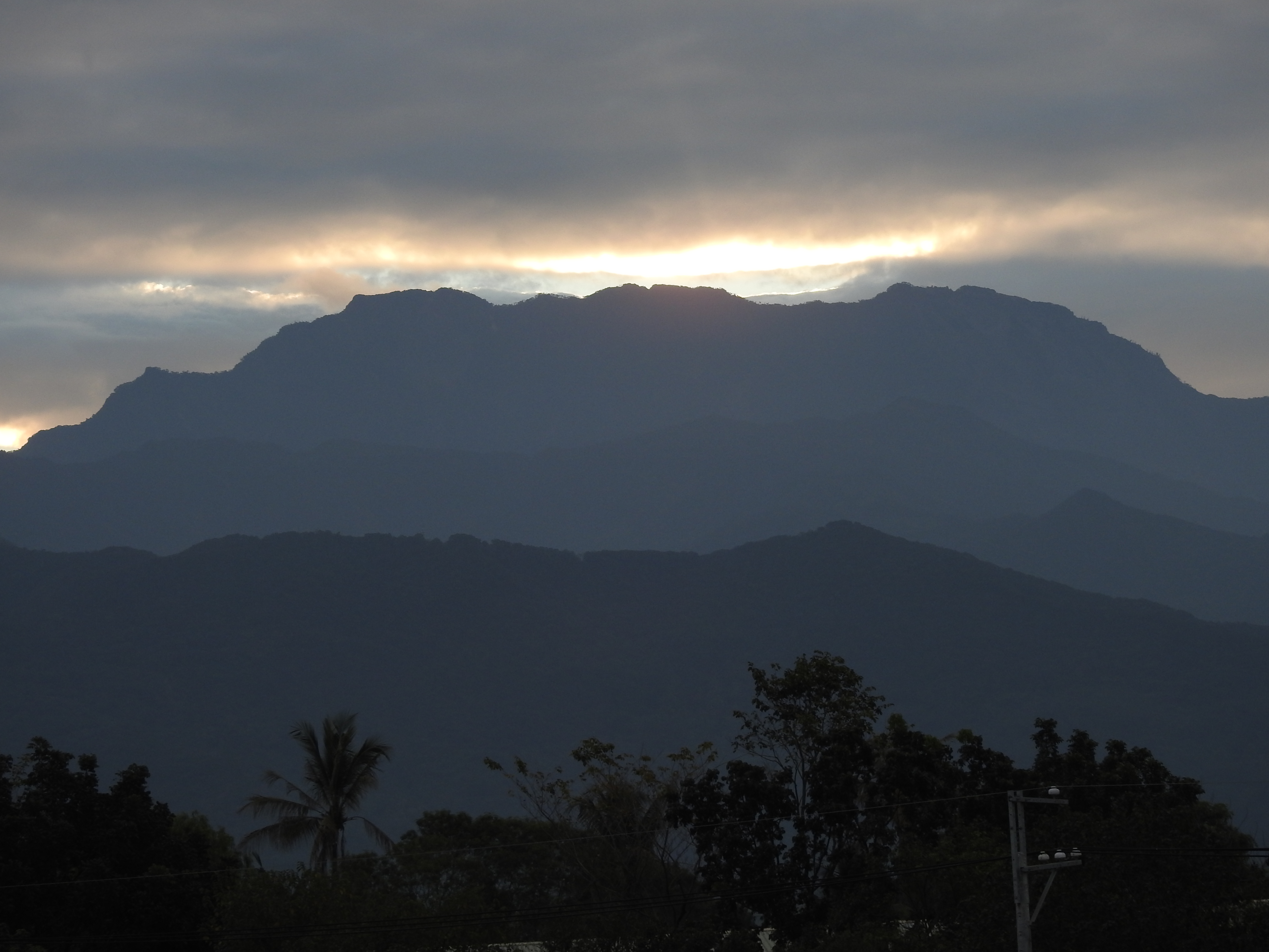 從屏東縣內埔鄉大新村仰望的北大武山